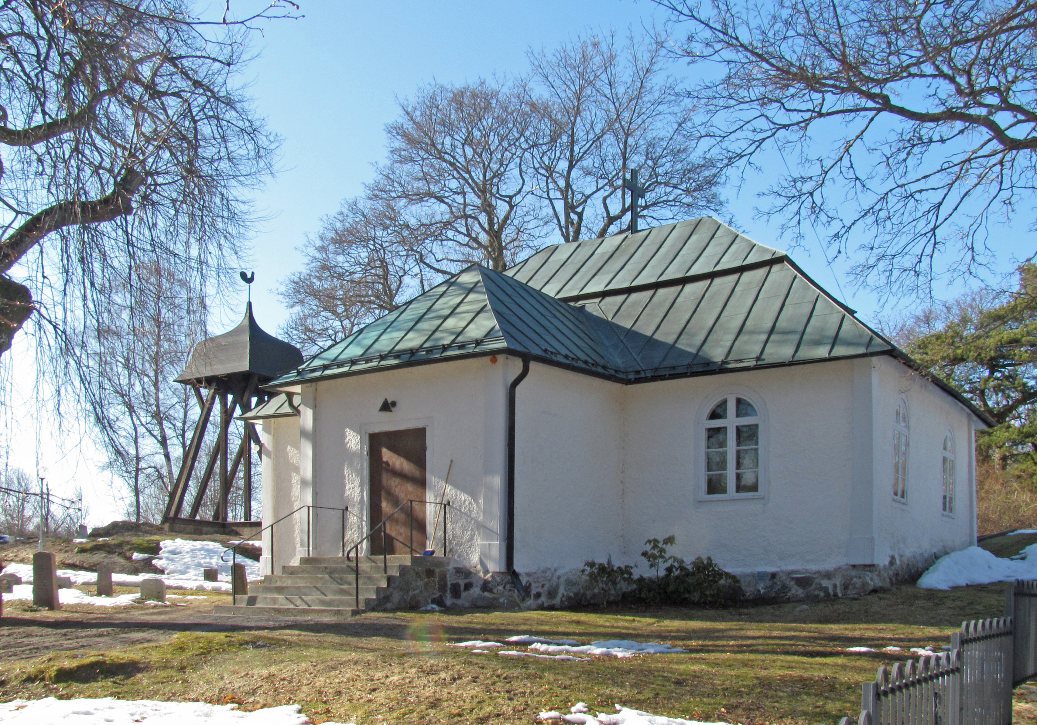 Torö kyrka